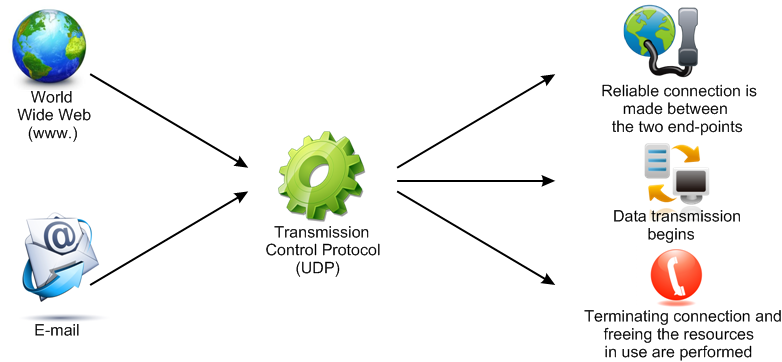 Монгол: Зураг 1